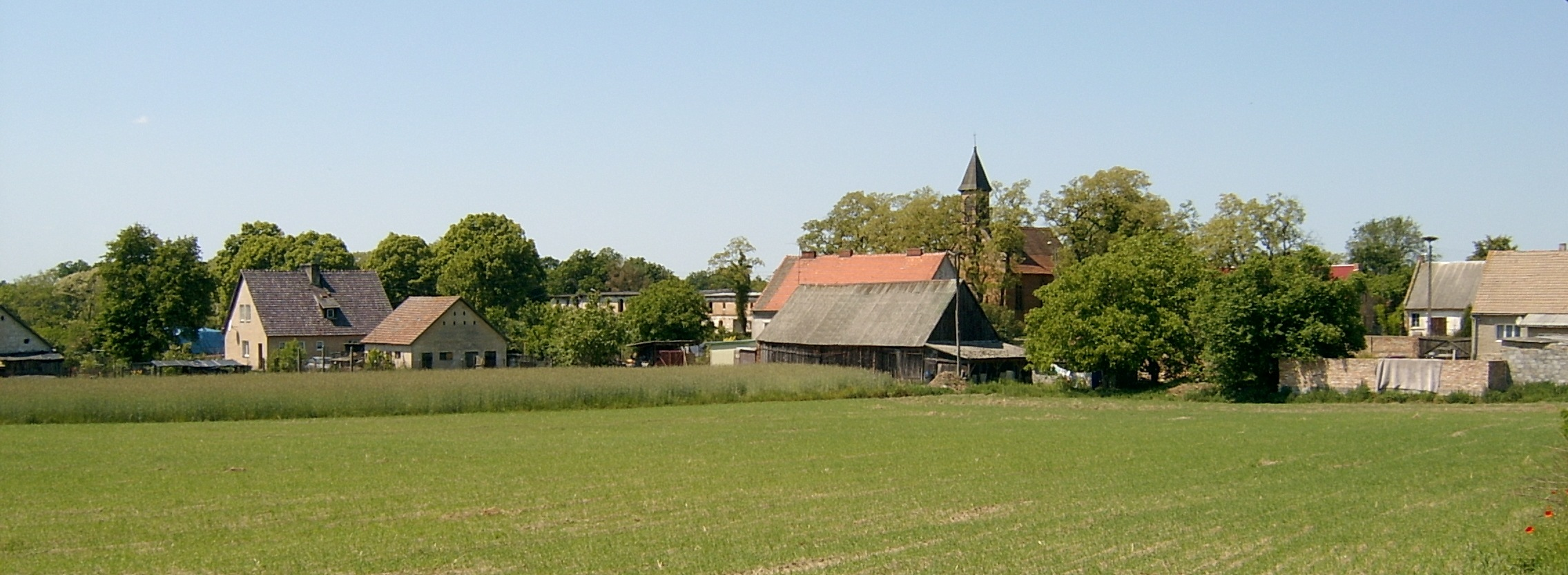 Stare Biskupice (Słubice)